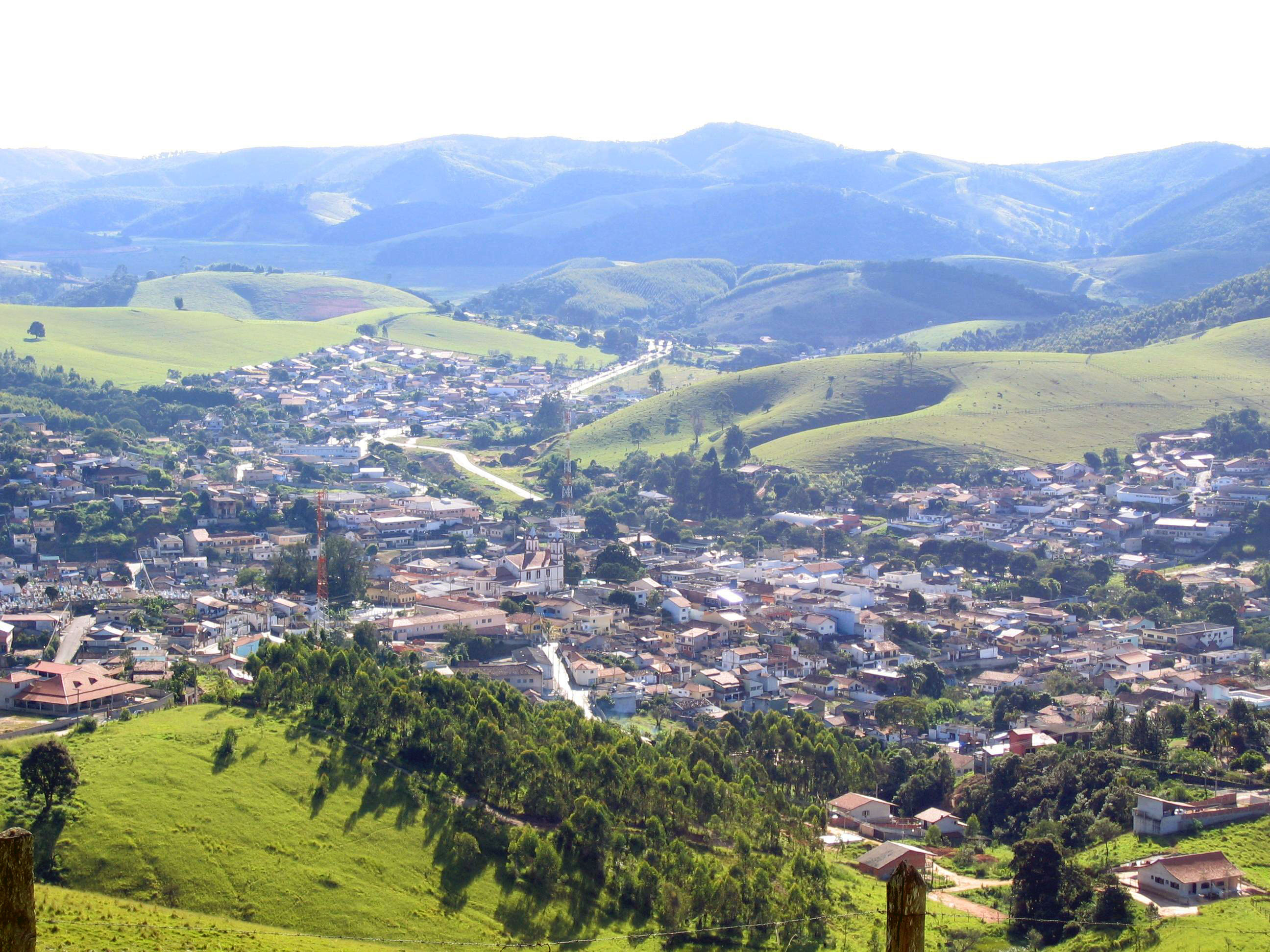 Vista geral da cidade de Salesópolis